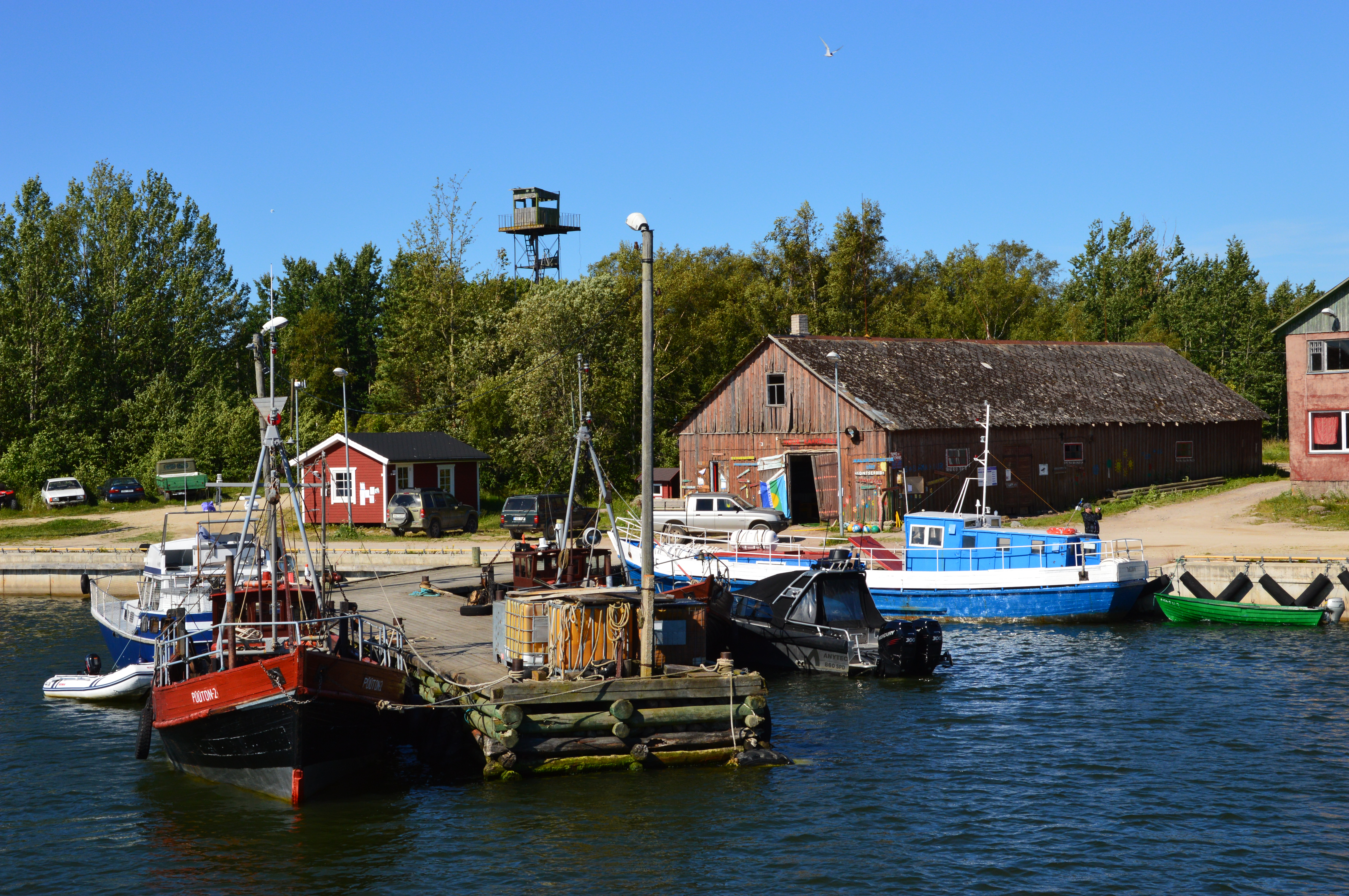 Kelnase sadam